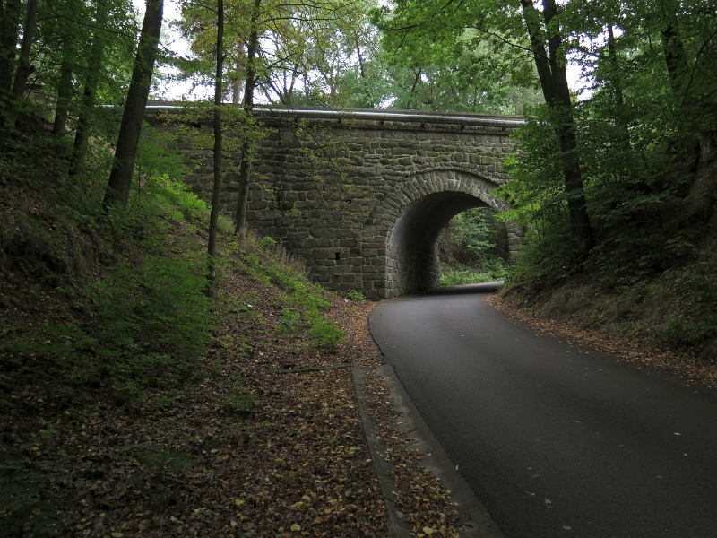 Silniční most, Staré Prachatice.